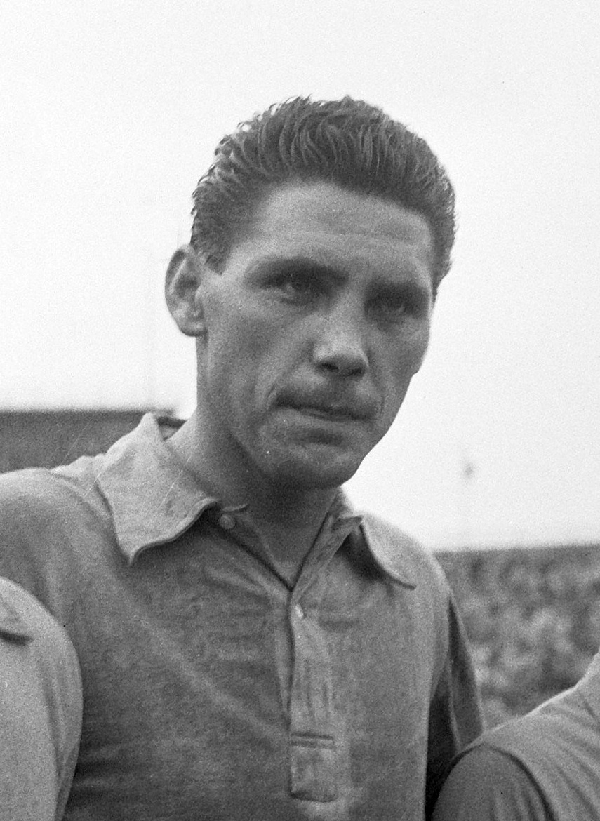 Fifa Elftal, Ernst Ocwirk. Betreft demonstratiewedstrijd van Fifa-elftal tegen CF Barcelona in Olympisch stadion